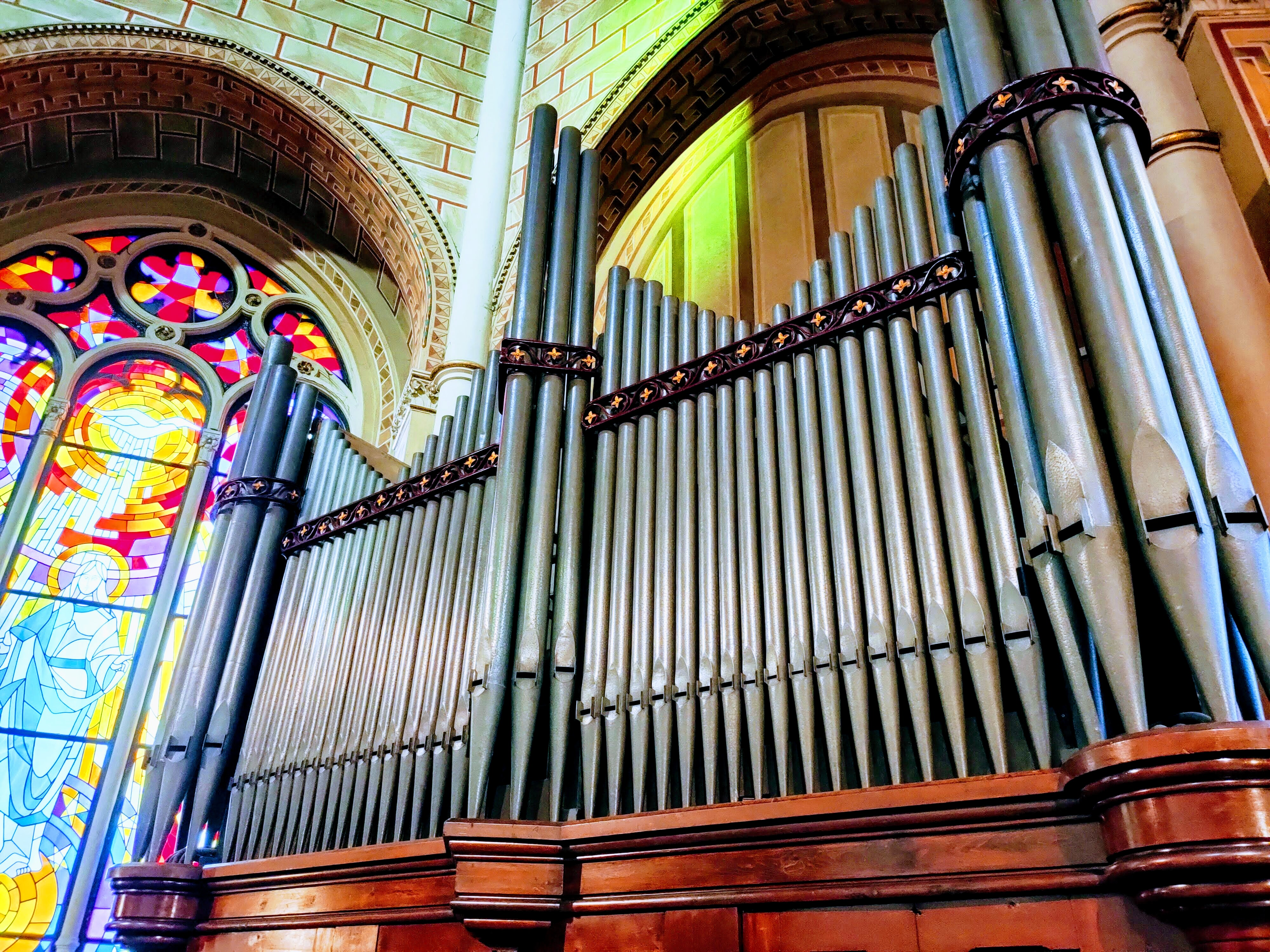 Organo Principale della Chiesa Santa Maria delle Grazie al Naviglio (MI)